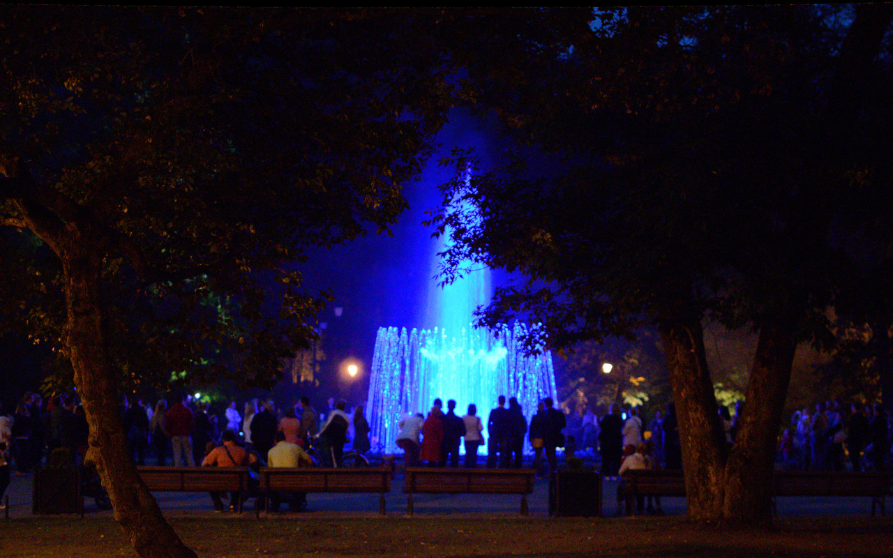 Bernardinai Garden in Vilnius